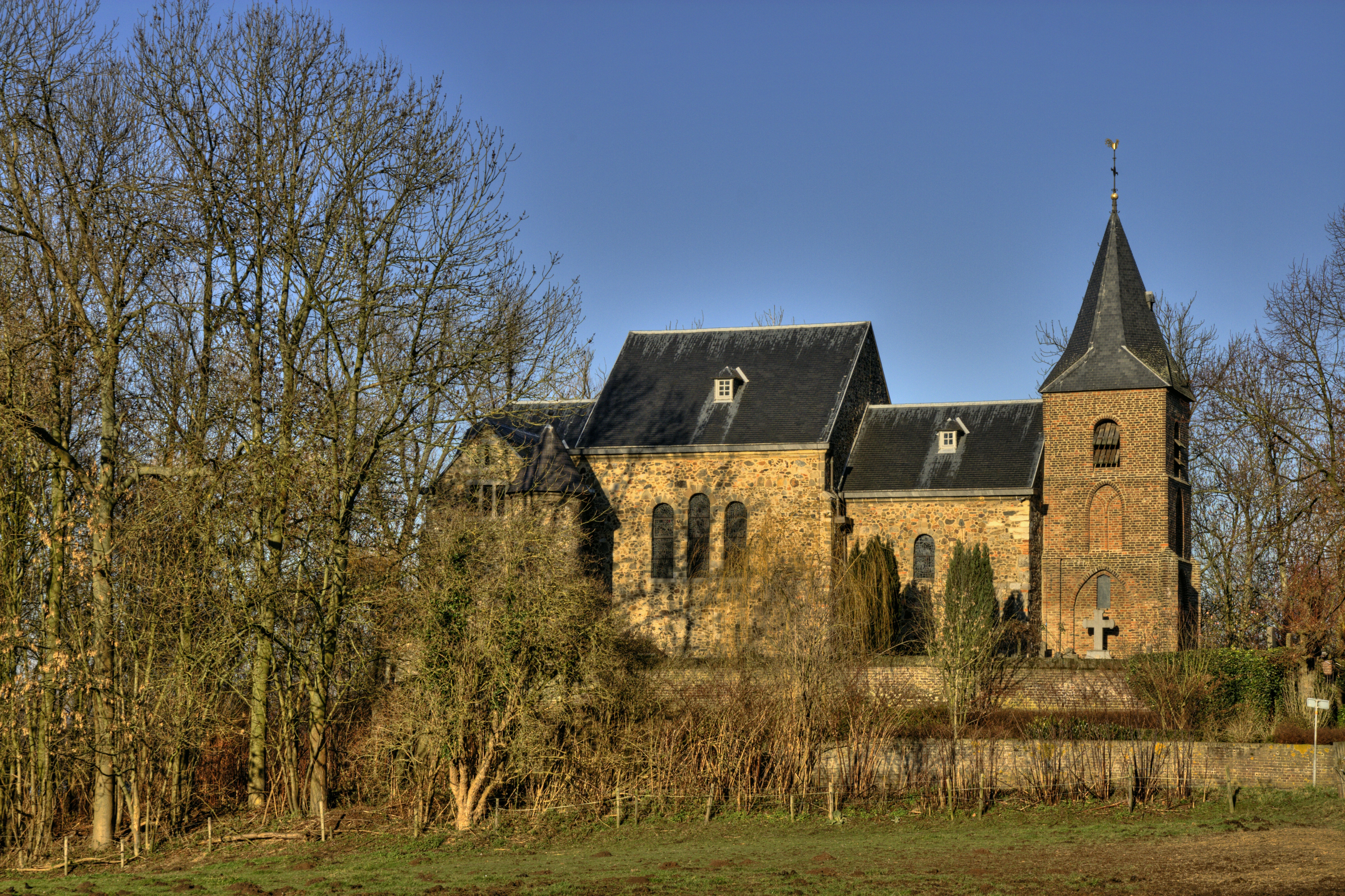 Dionysius- of Rozenkerkje